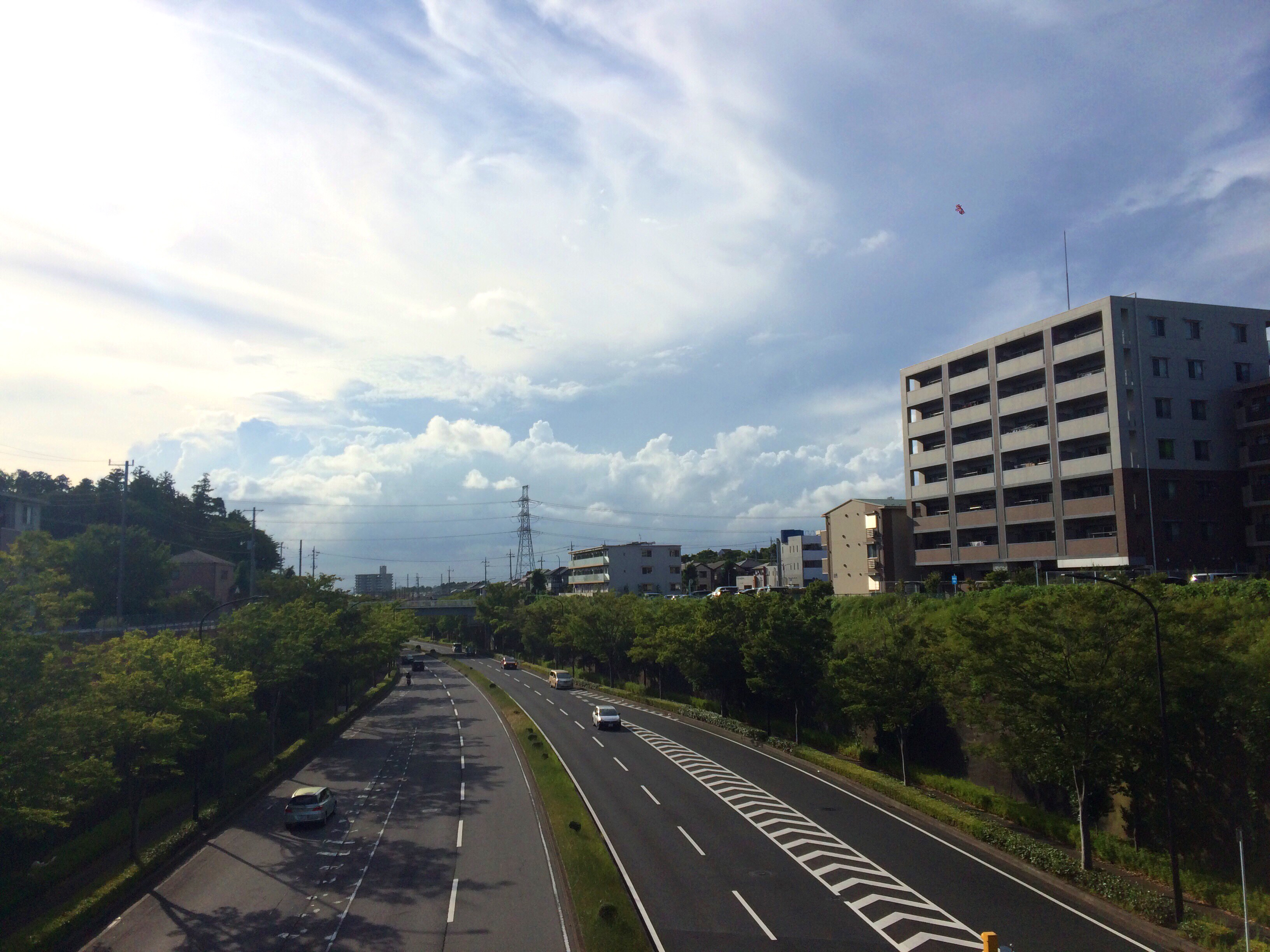 おゆみ野 どうろ